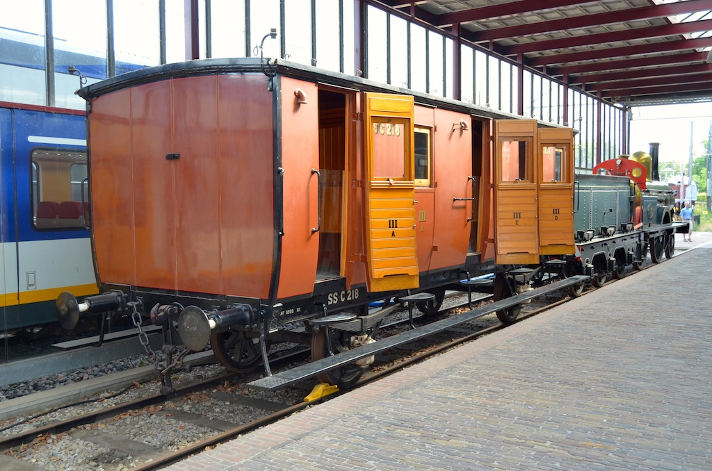 Nederlands Spoorwegmuseum rijtuig SS 218. Foto: Erik Swierstra.